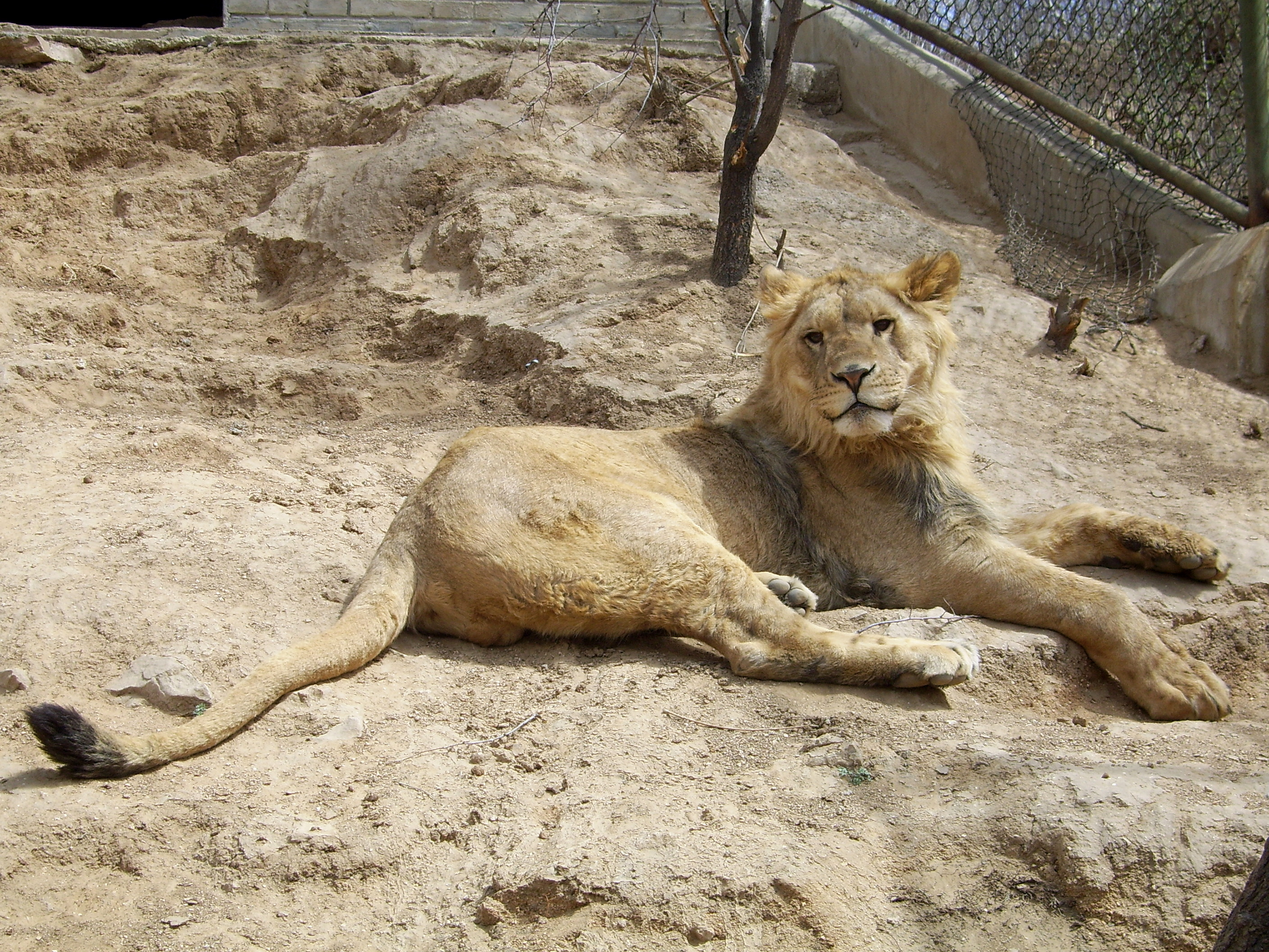 母狮，于北京野生动物园